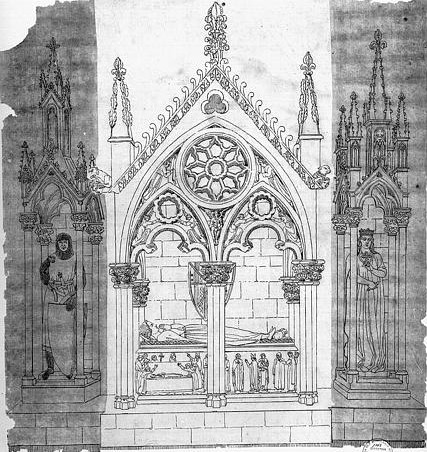 Mausolée de Raymond Béranger IV, détruit en 1793